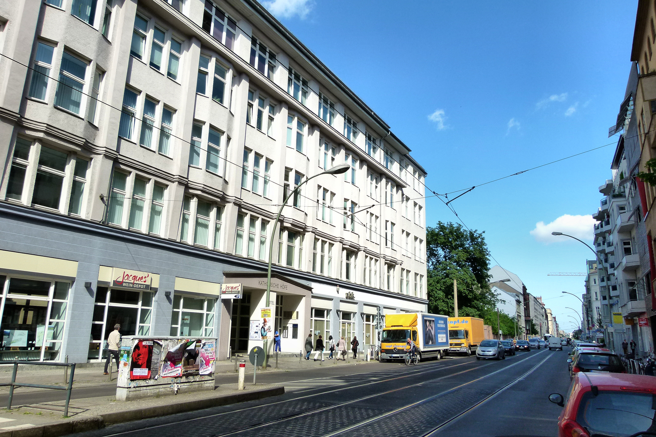 Die Katholischen Höfe Chausseestraße 128-129